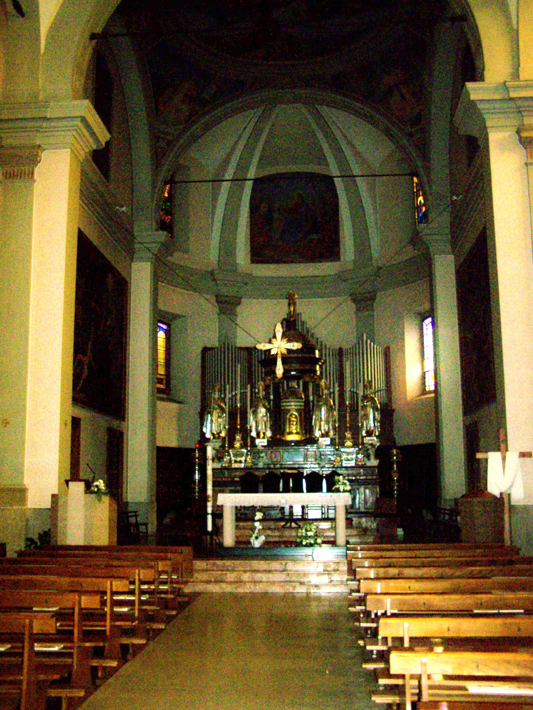 Interno della chiesa di Boffalora sopra Ticino (MI) - Italia